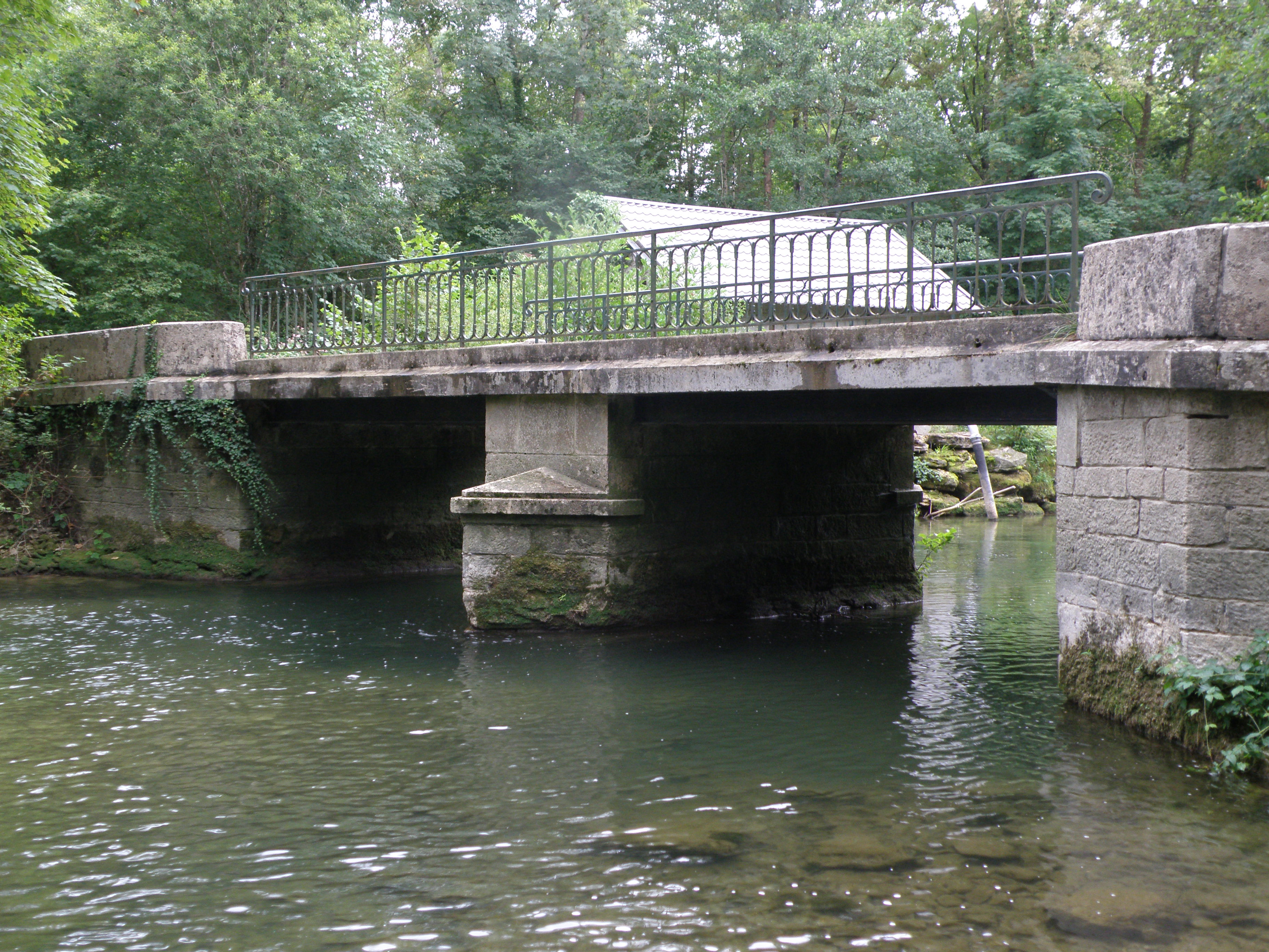 Pont sur l'Ource à Mores, 10110 Celles-sur-Ource